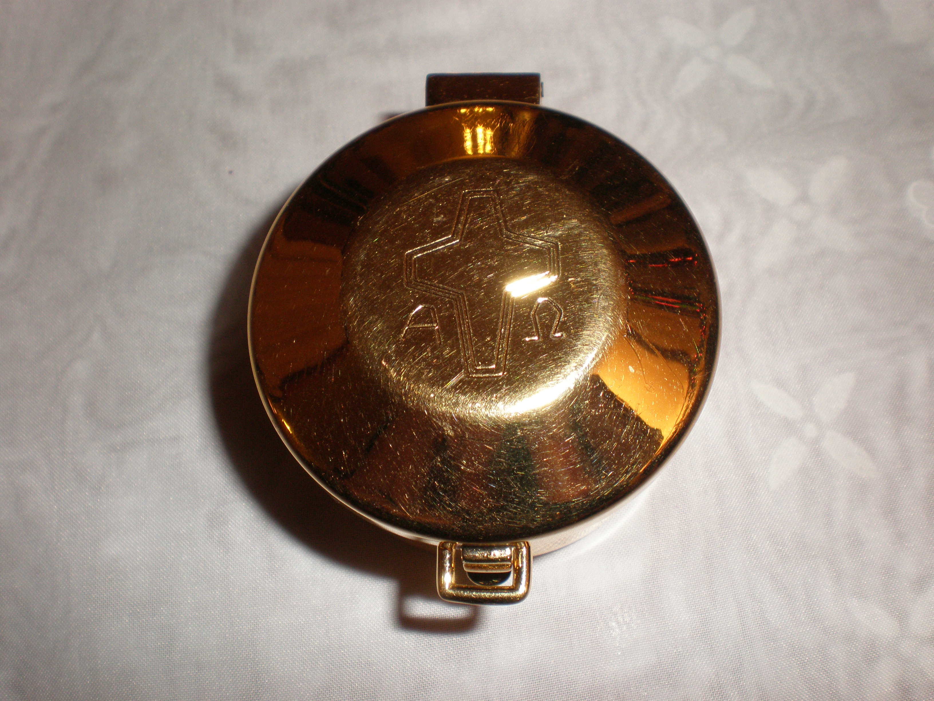 A bronze pyx.